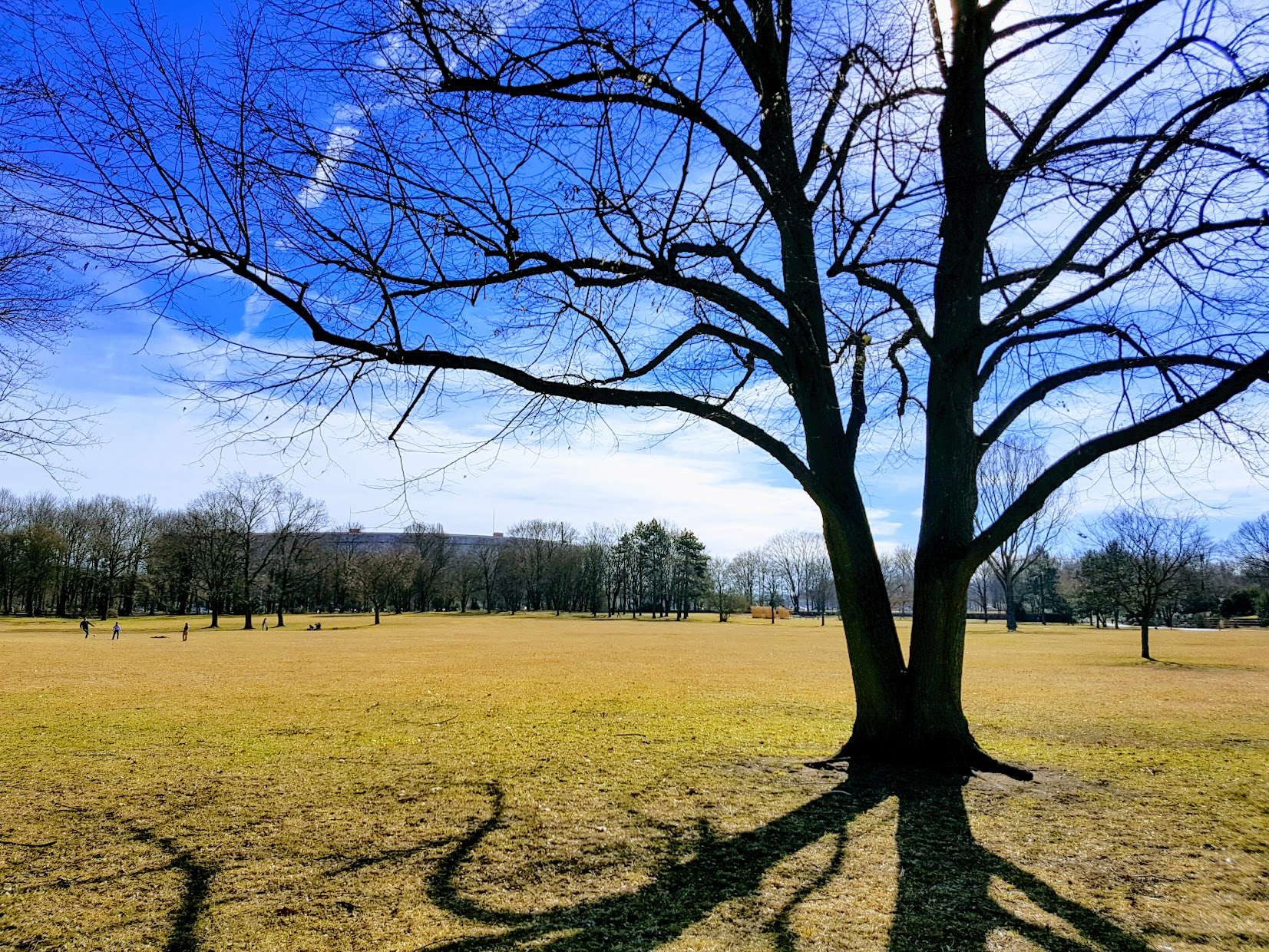 Luitpoldhain (2016)